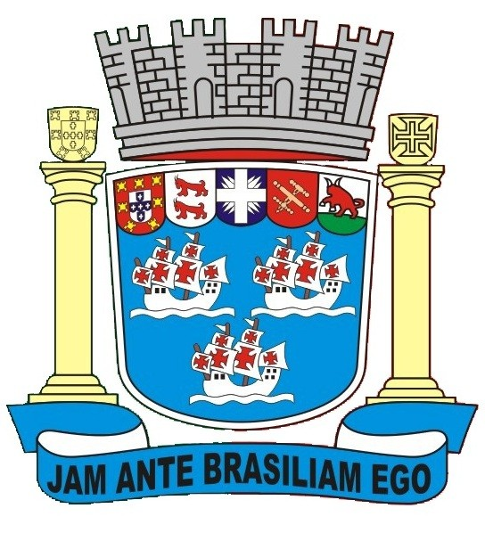 Brasão Oficial da Cidade de Porto Seguro